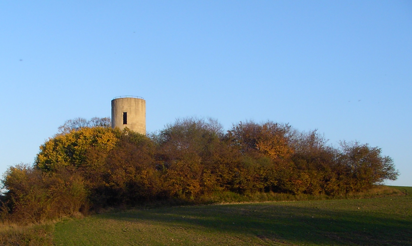 Bicklingswarte in der Quedlinburger Feldflur